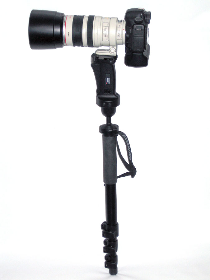 Self made; own equipment.